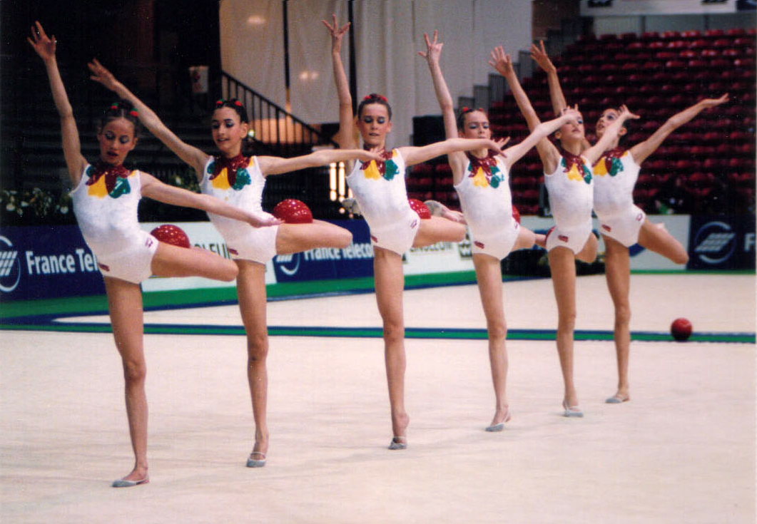 Conjunto español júnior de gimnasia rítmica en el Campeonato Europeo de Asker/Oslo en 1996. De izquierda a derecha: Carolina Montes, Ana Del Toro, Marta Calamonte, Carolina Malchair, Carmina Verdú y Beatriz Nogales. Como suplentes, el equipo también lo integraban Blanca López Belda y Tania Pacheco.